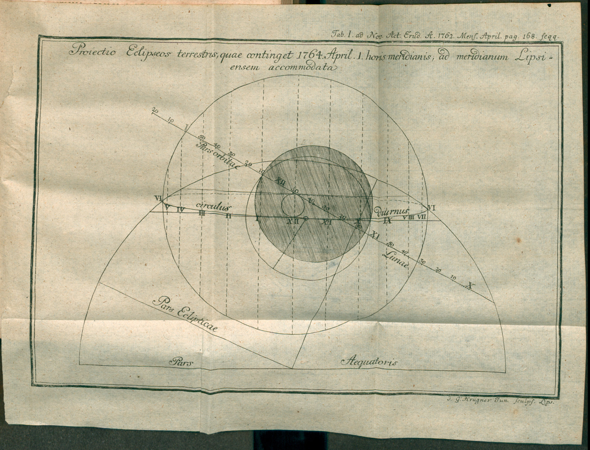 Illustration